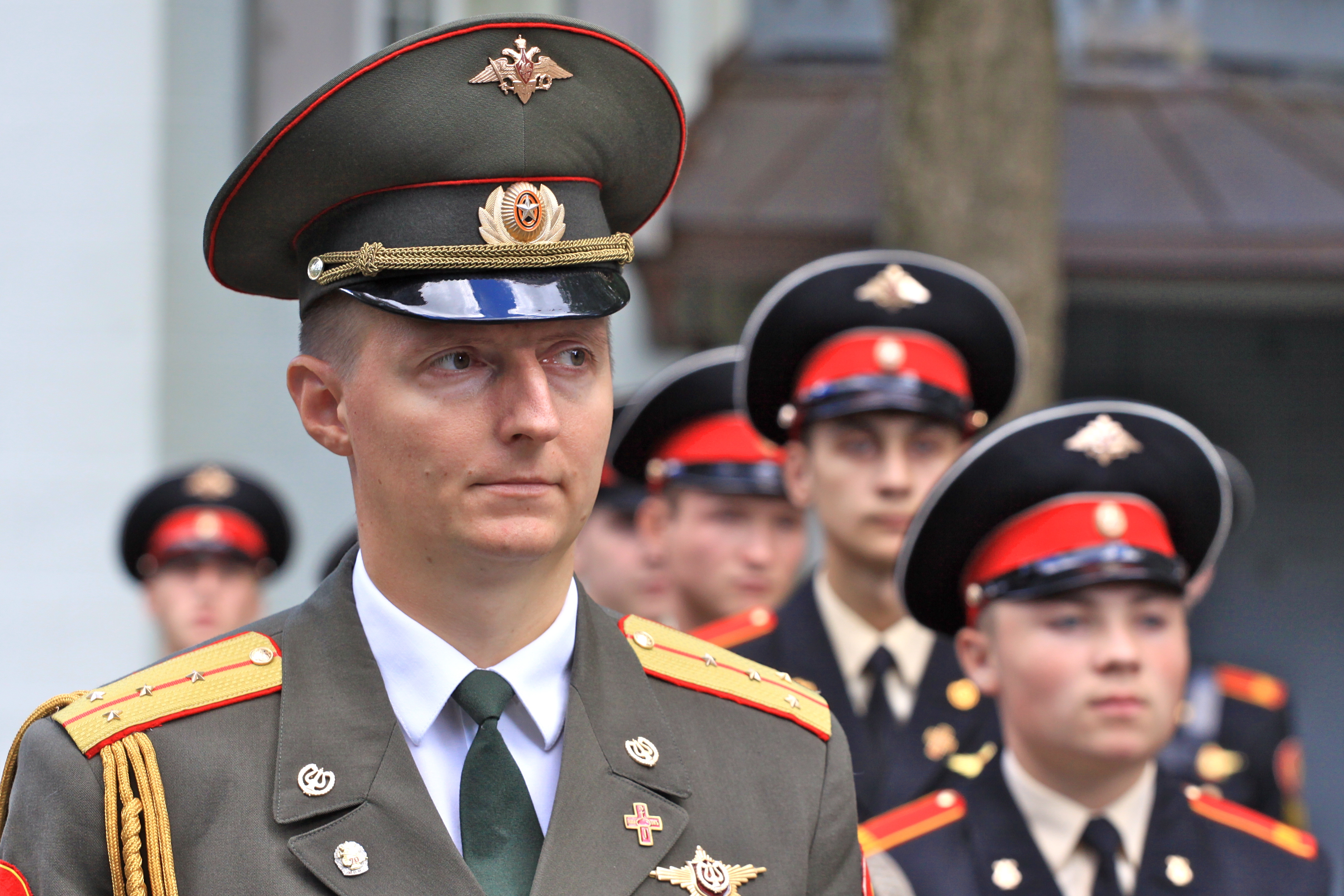 Sie dürfen das Foto mit Nennung des Autors honorarfrei vervielfältigen, verbreiten und öffentlich zugänglich machen. Foto: Jürg Vollmer / Infos